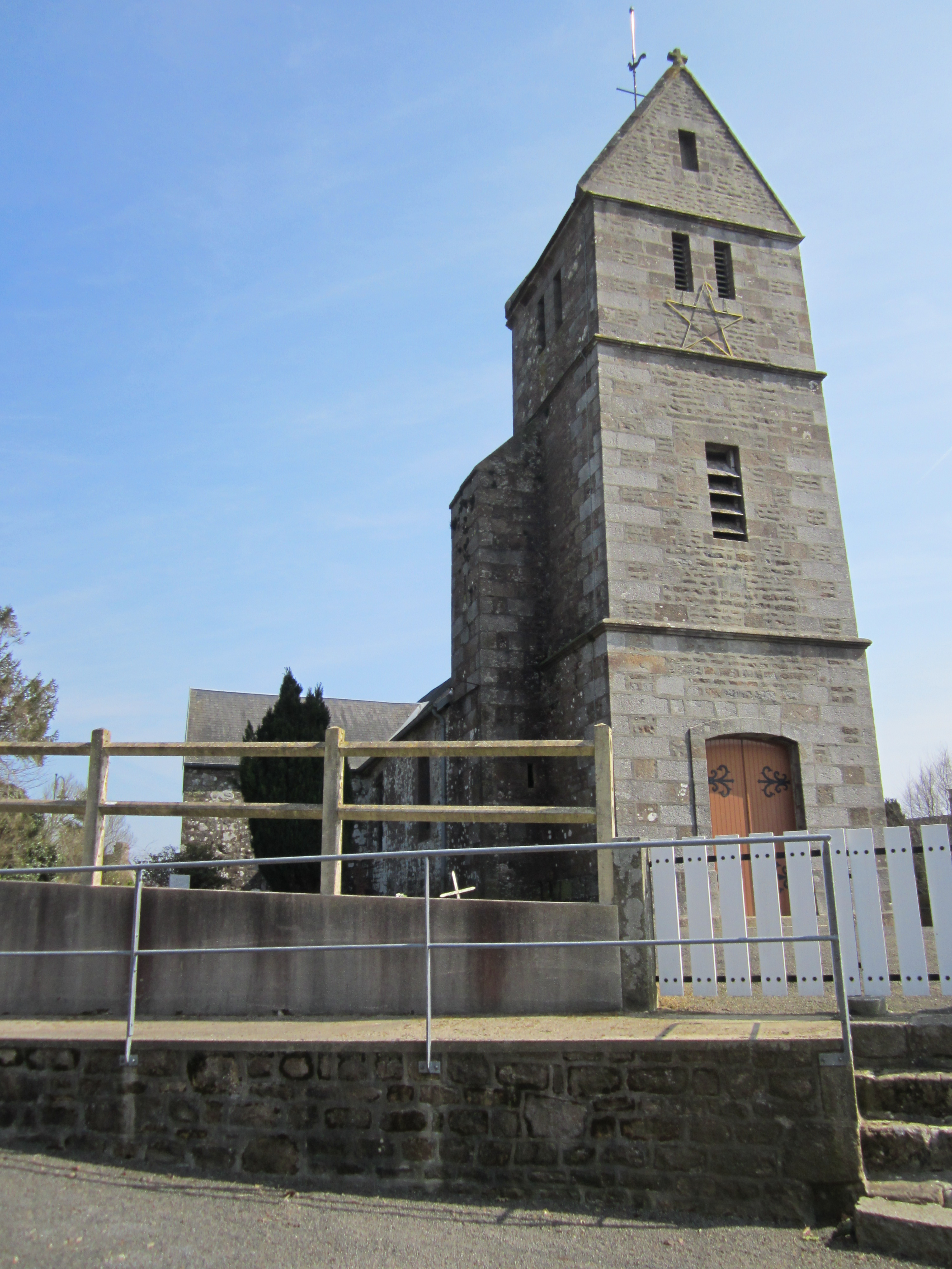 Église Saint-Cyr-et-Sainte-Julitte de la Chapelle-Cécelin